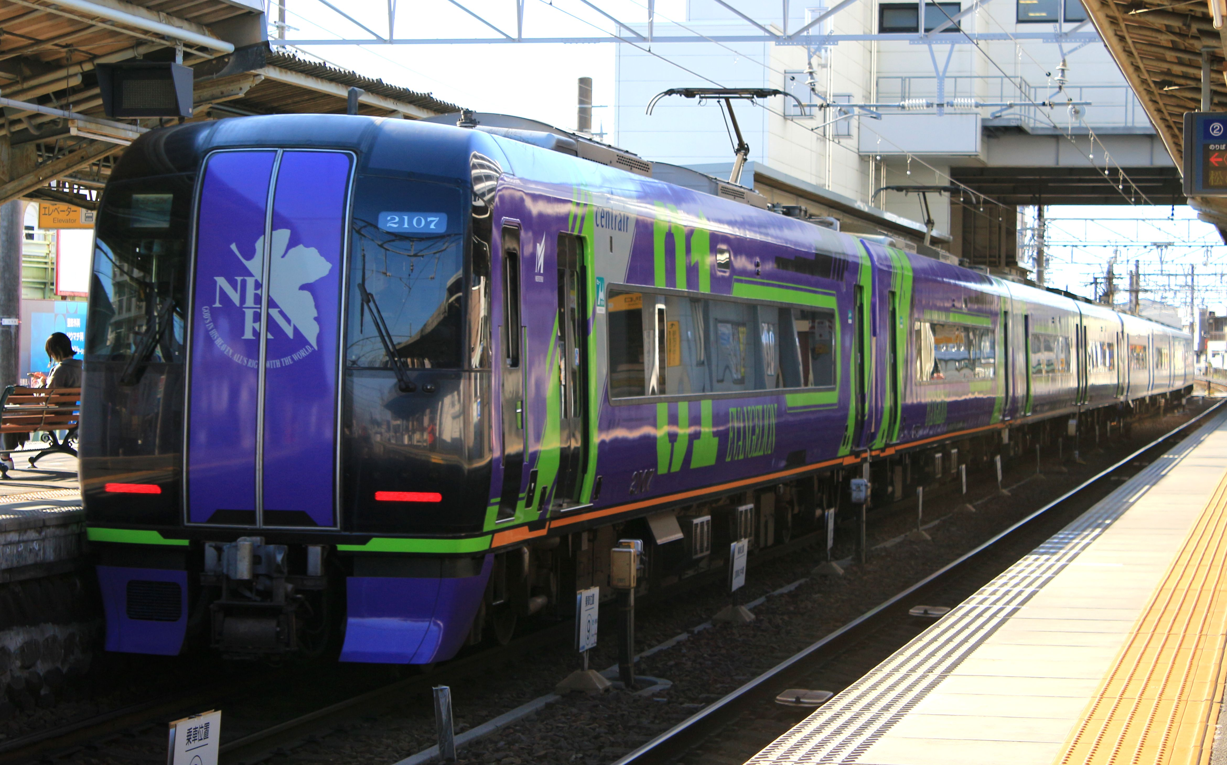 名古屋鉄道 2107F エヴァンゲリオンミュースカイ 国府宮駅